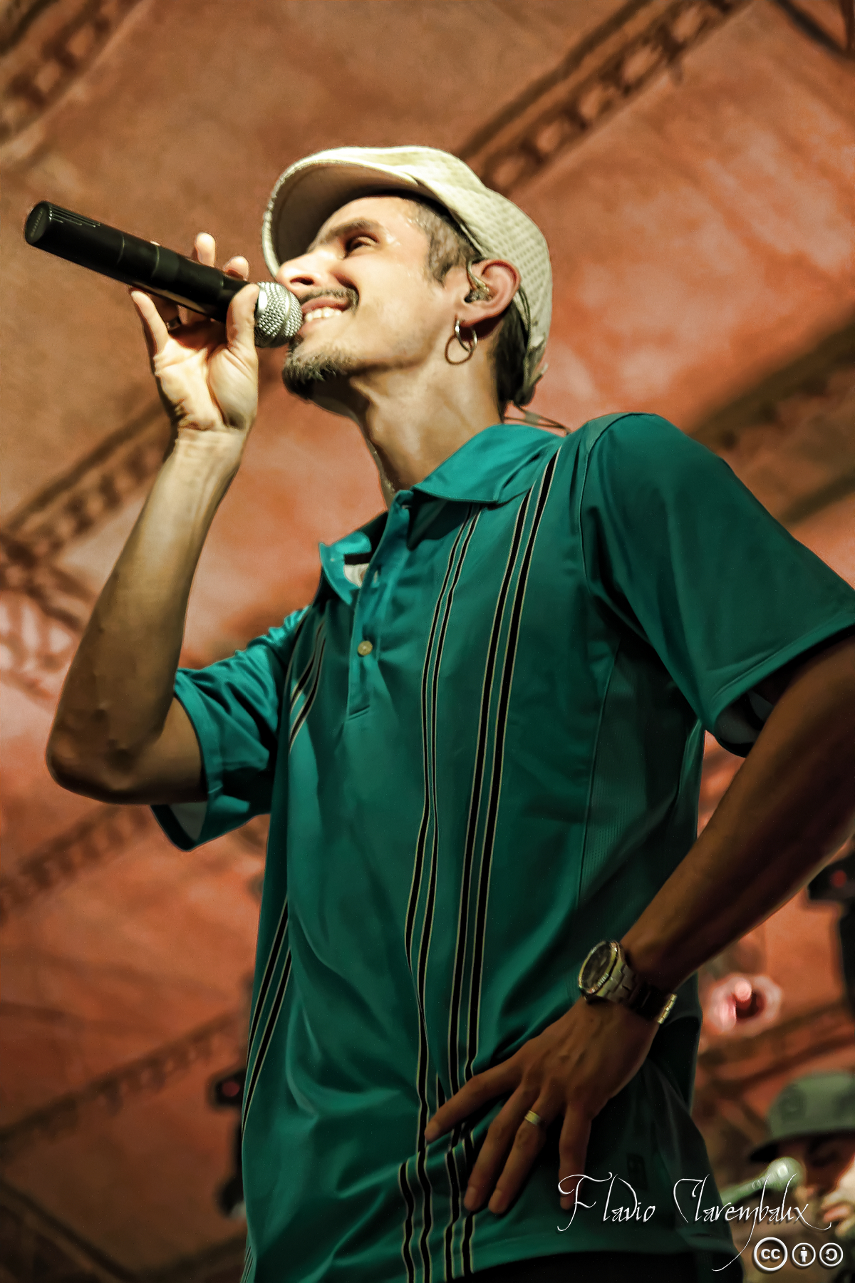 Guillermo Bonetto, cantante de Los Cafres.